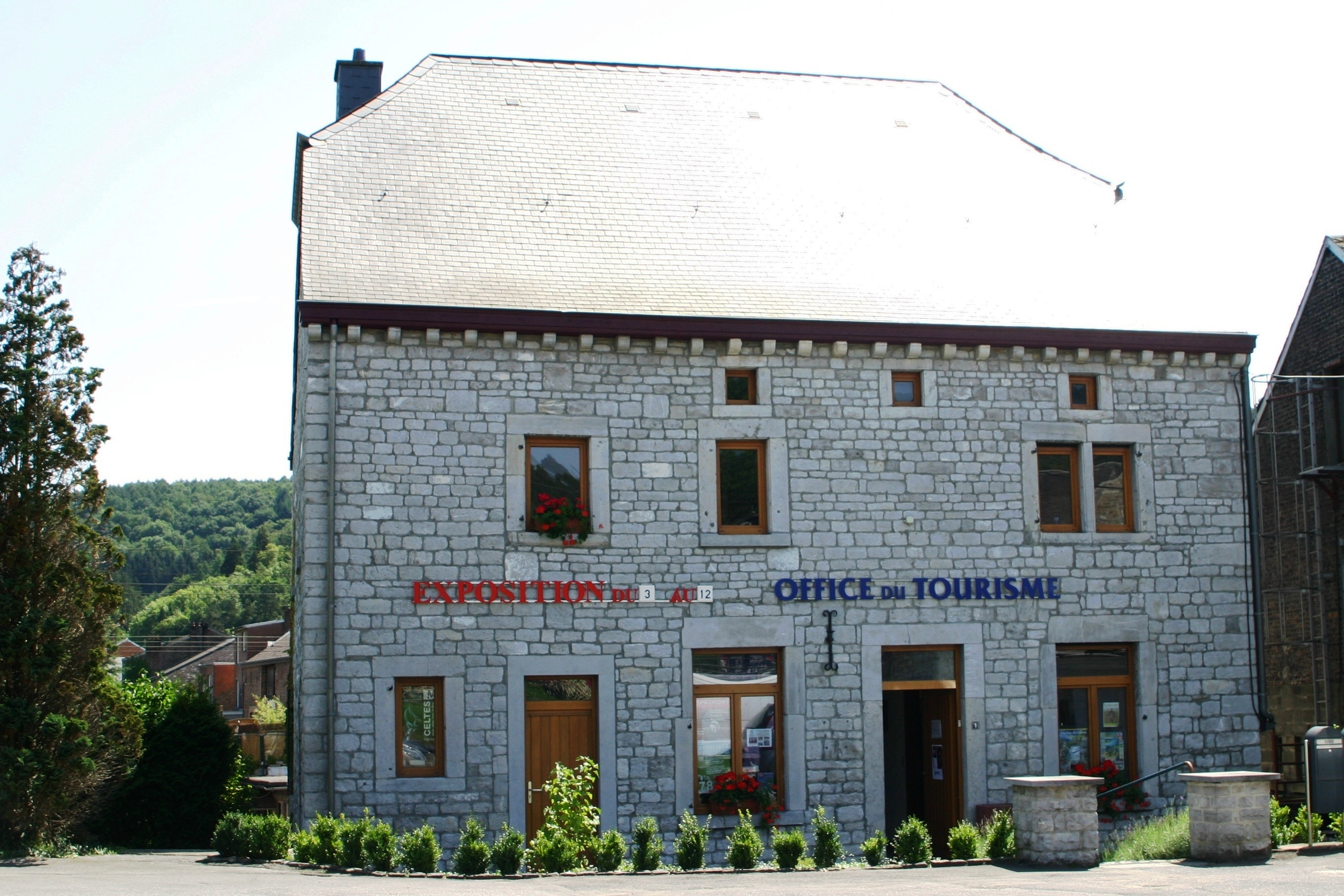 D'Maison du Piqueur zu Hamoir. Maison du Piqueur Maison du Piqueur